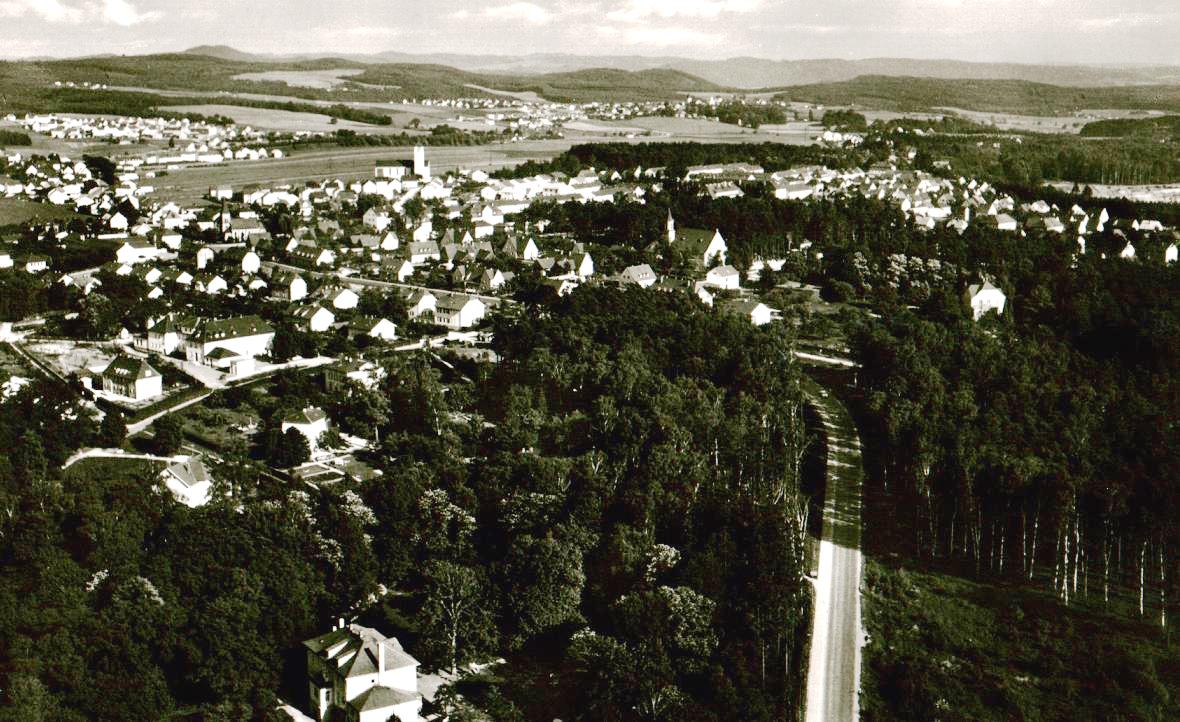 Eisenwerk 1963